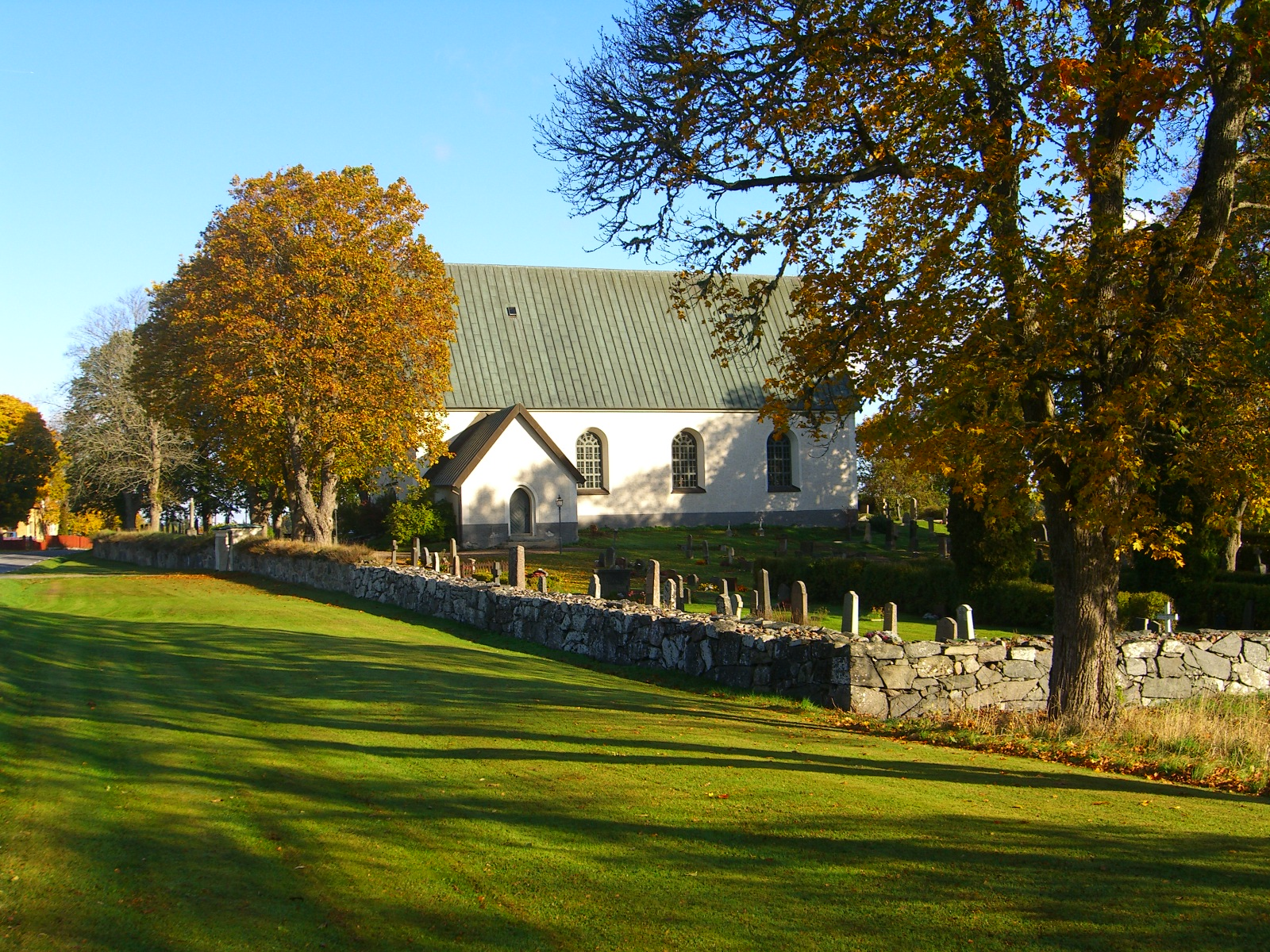 Söderby-Karls kyrka